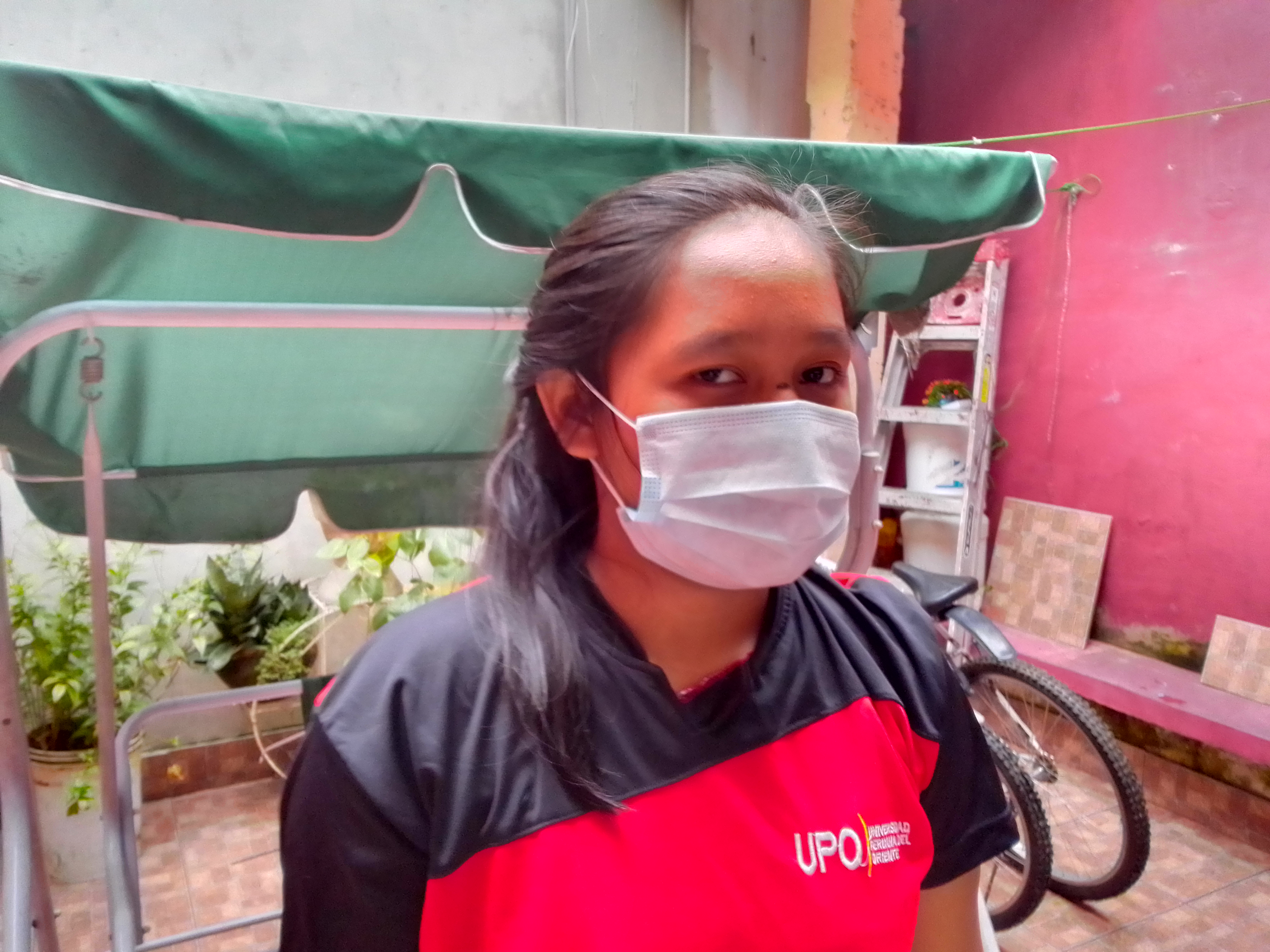 Joven mujer con mascarilla en Iquitos por la epidemia de coronavirus